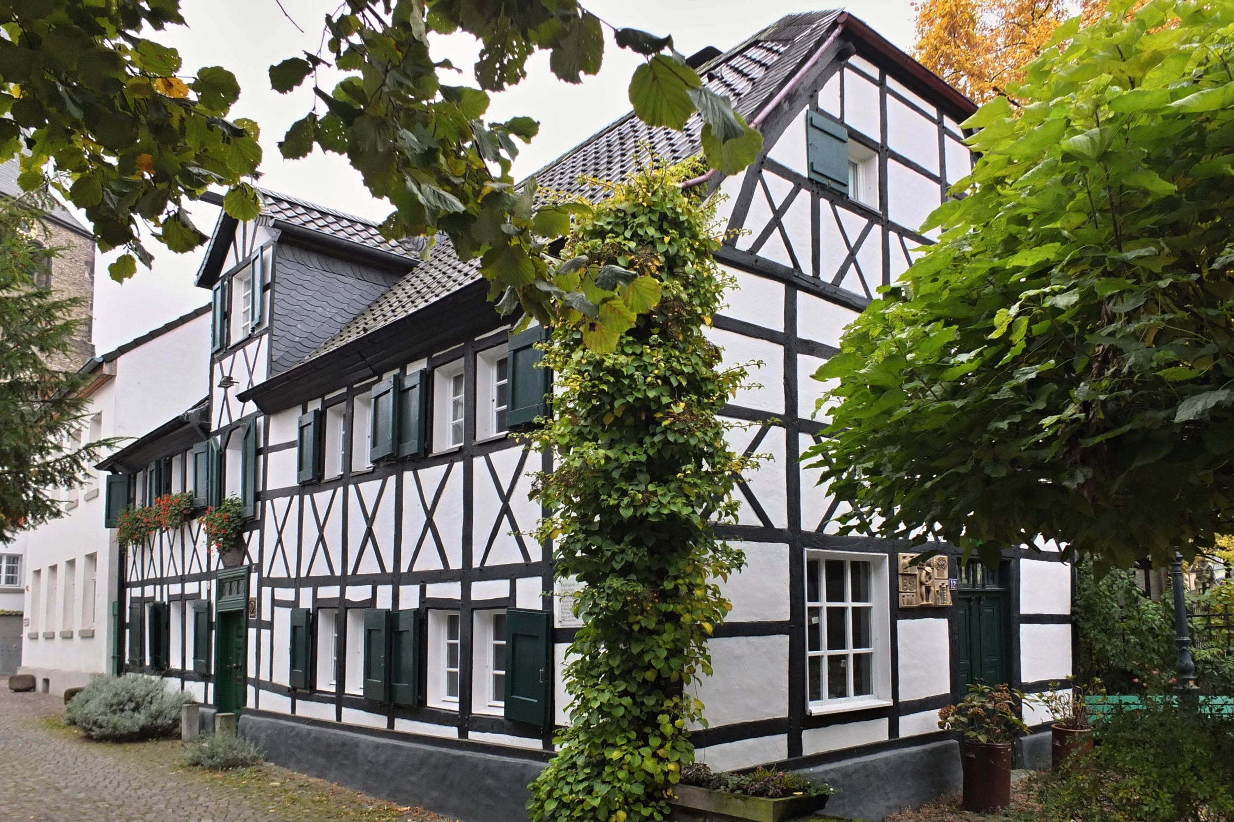 Kückeshaus, ehemaliges Armenhaus der Reformierten Gemeinde Hilden, Hilden, Eisengasse 2 / Schwanenstraße 12, Ansicht Eisengasse